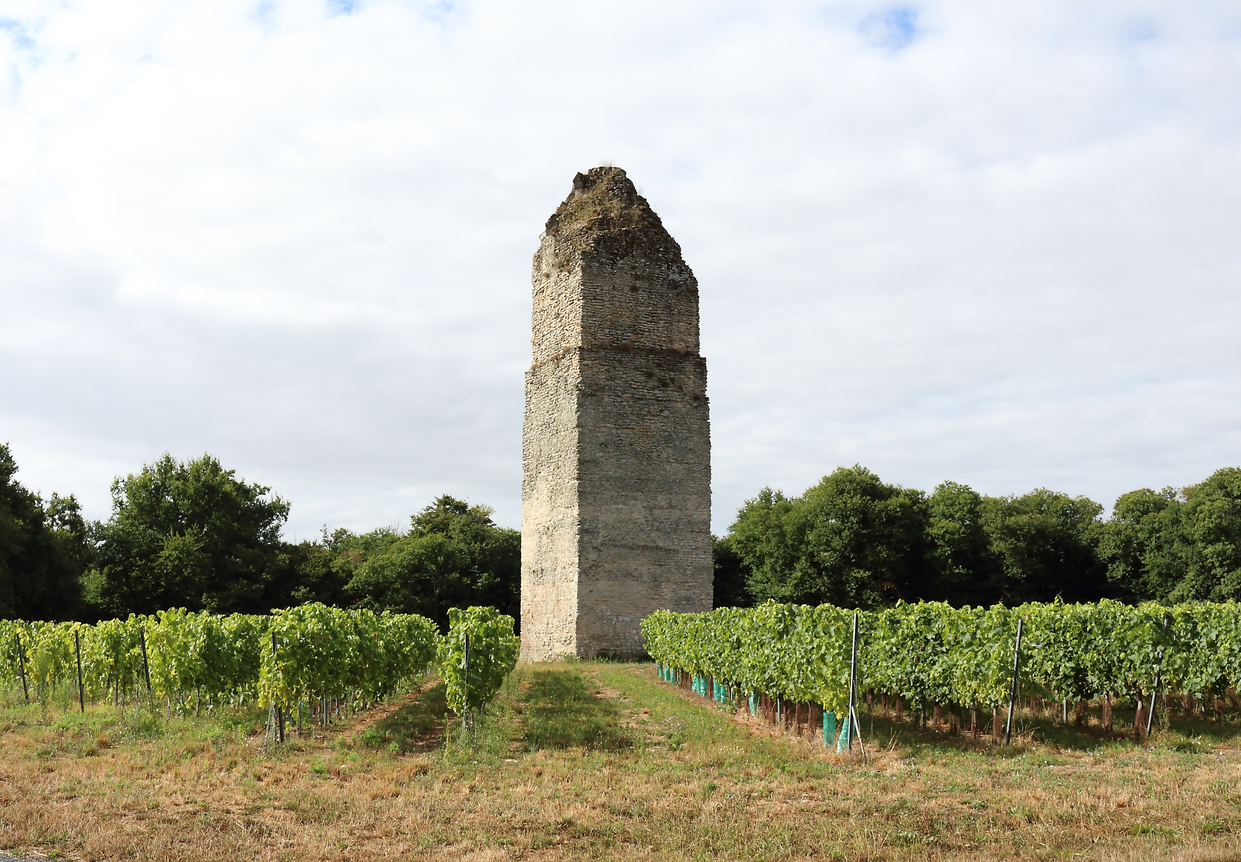 La tour de Pirelonge dans les vignes de Saint-Romain-de-Benet, Charente-Maritime, Poitou-Charentes, France.